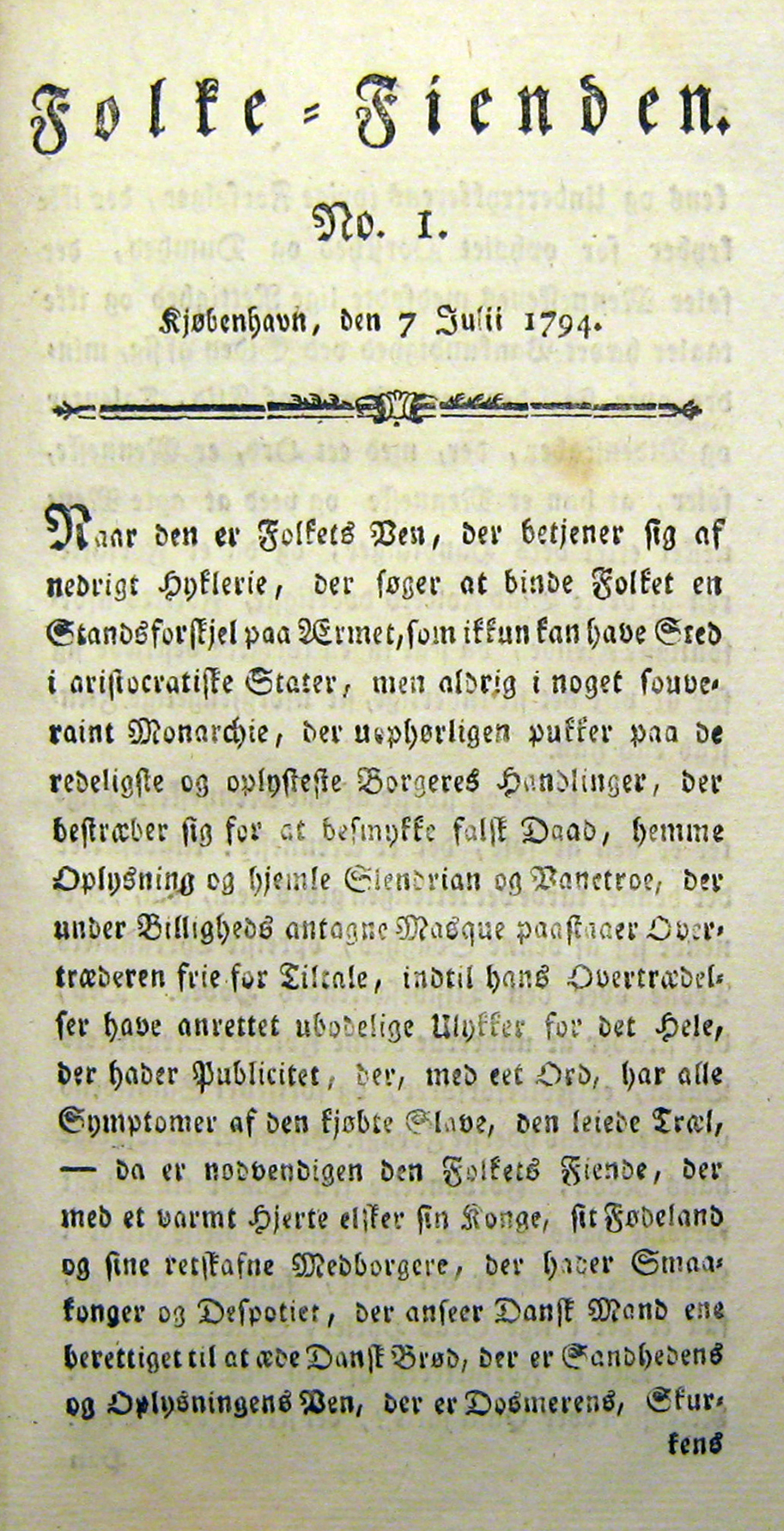 Tidsskriftet Folke-Fienden, 1794. Udgivet af Johan Werfel.